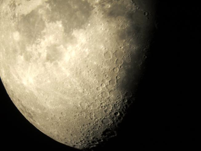 Fàcia visibla de la Luna dins sa partida sud-orientala. Fotografia realizada en 2007.